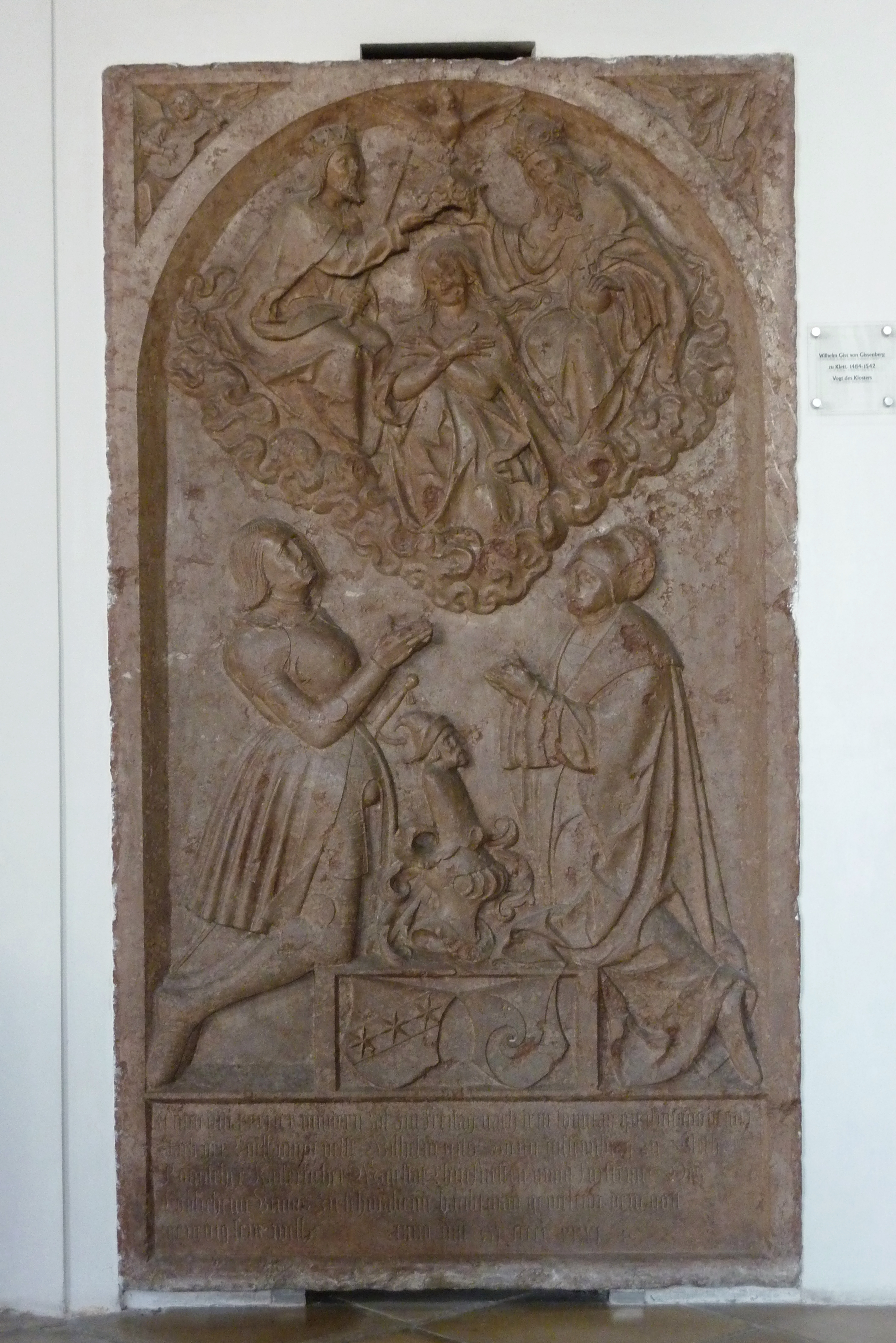 Katholische Pfarr- und Wallfahrtskirche St. Peter und Paul in Oberelchingen, einem Ortsteil von Elchingen im Landkreis Neu-Ulm (Bayern), Epitaph des Vogtes Wilhelm Giss von Gissenberg zu Klett (1484-1542)